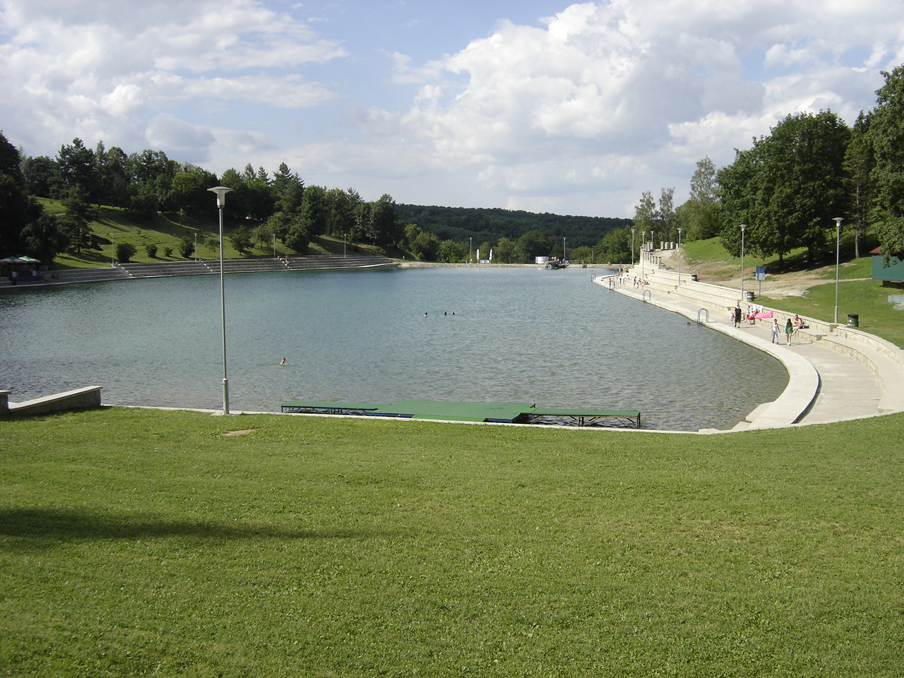 Orahovačko jezero, Hrvatska